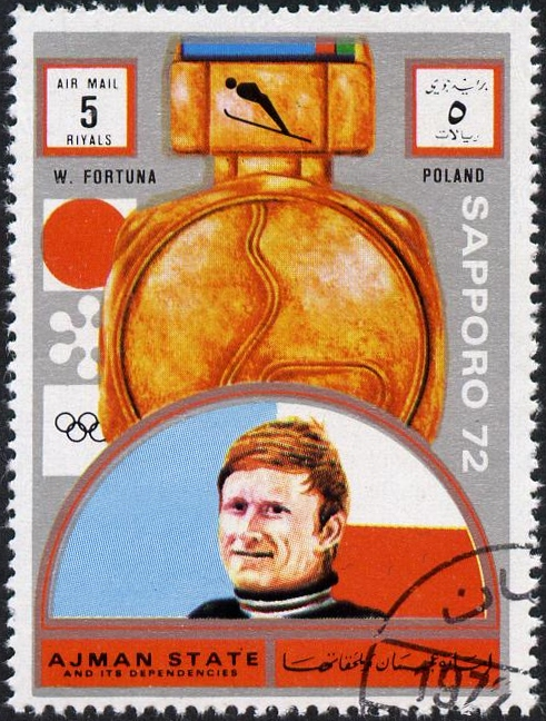 Wojciech Fortuna